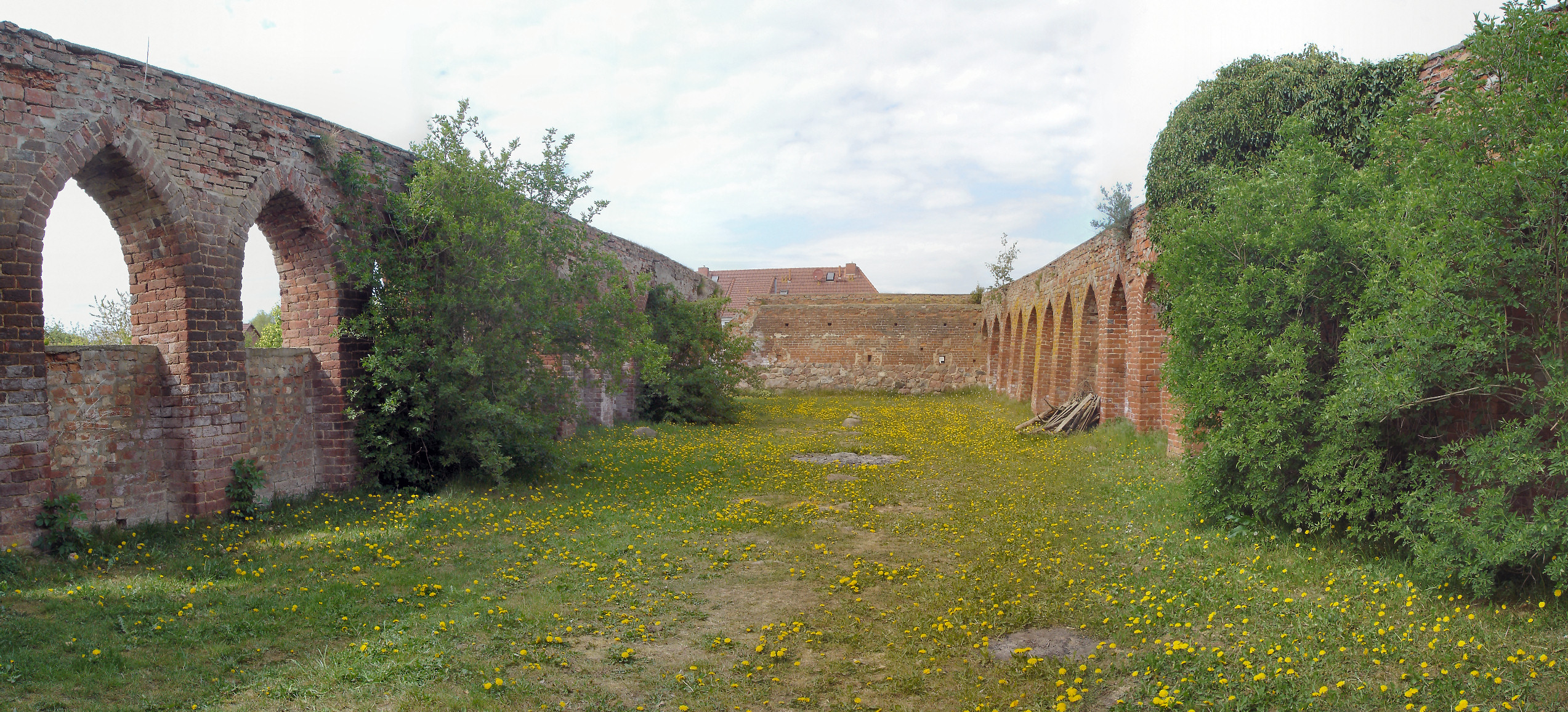 Kloster Doberan Klosterscheune Althof / Monastery Doberan, barn in Althof